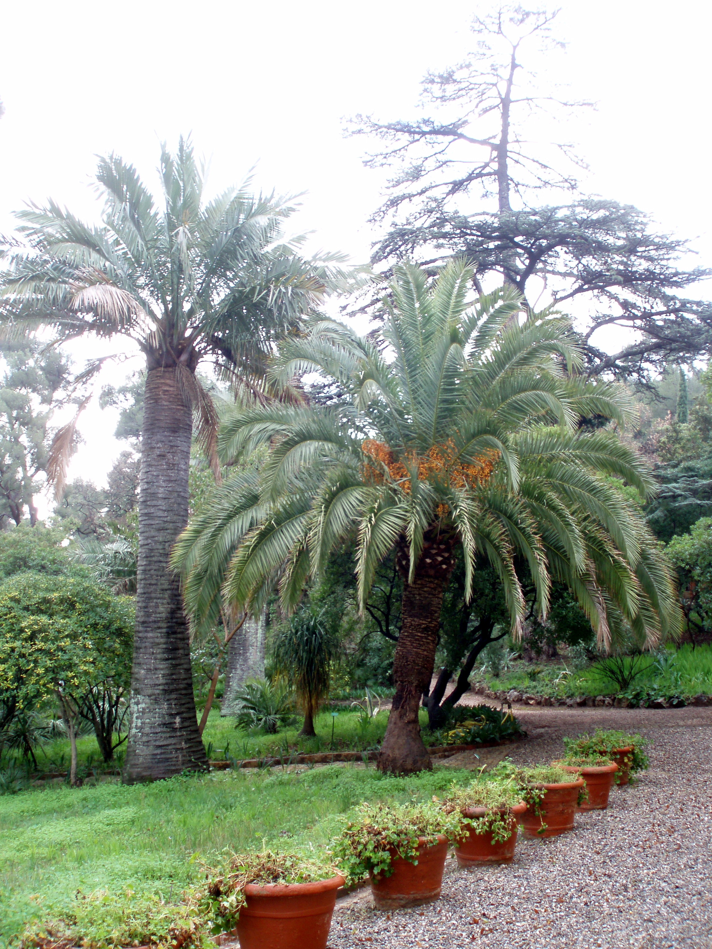 Le Plantier